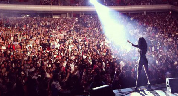 Inna demostró que puede ser la mejor anfitriona de una fiesta, pues su filosofía de bailar hasta que el cuerpo aguante contagió a 10 mil "club rockers" que convirtieron el Auditorio Nacional en un reventón ardiente.